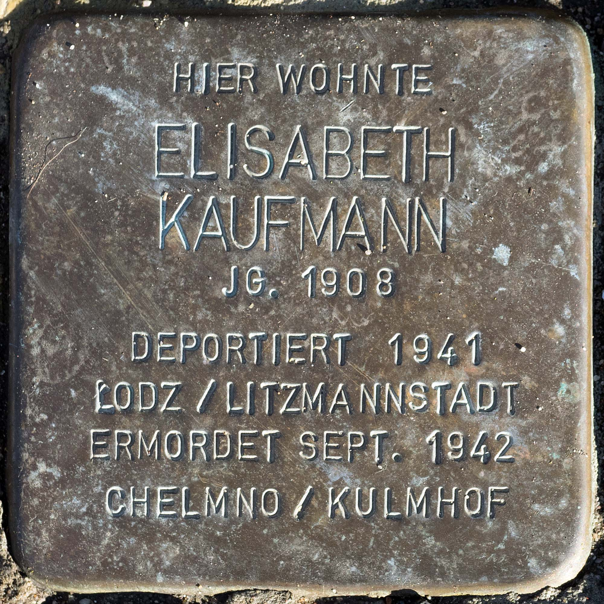 Stolperstein für Kaufmann Elisabeth